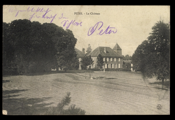 Carte postale de 1914 montrant le château de Puxe (Meurthe-et-Moselle).